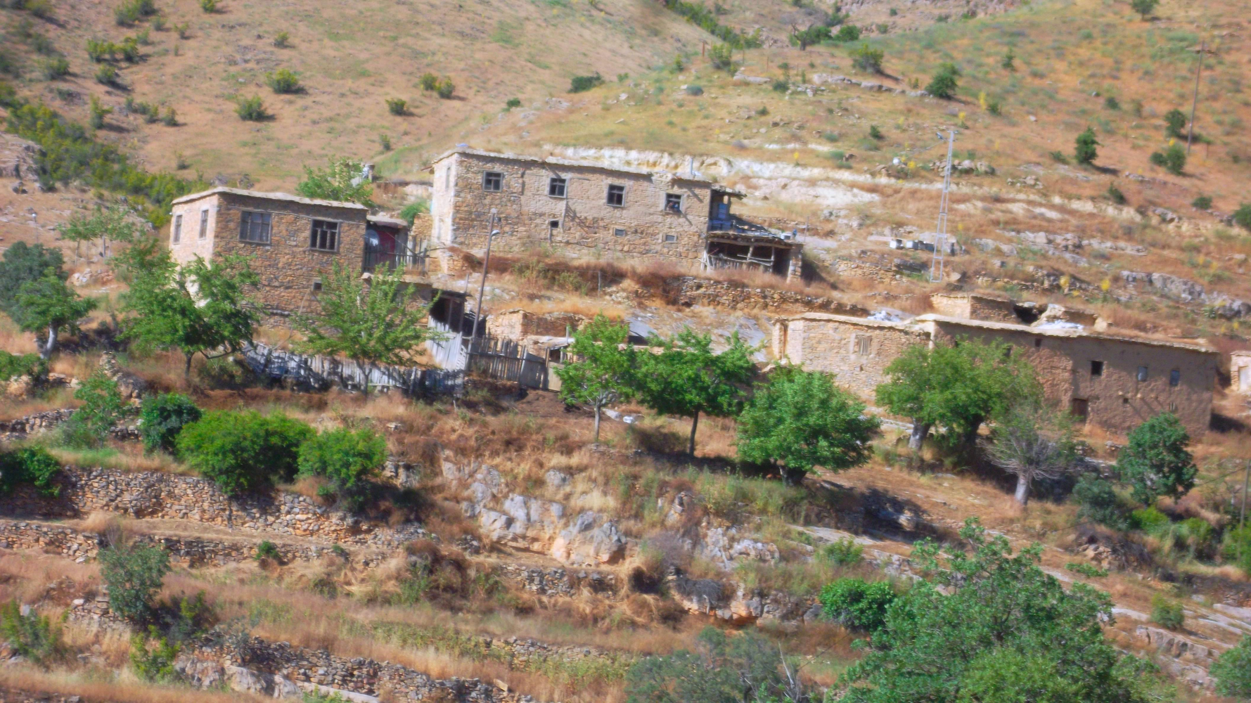 Evler genelde kerpiçlidir